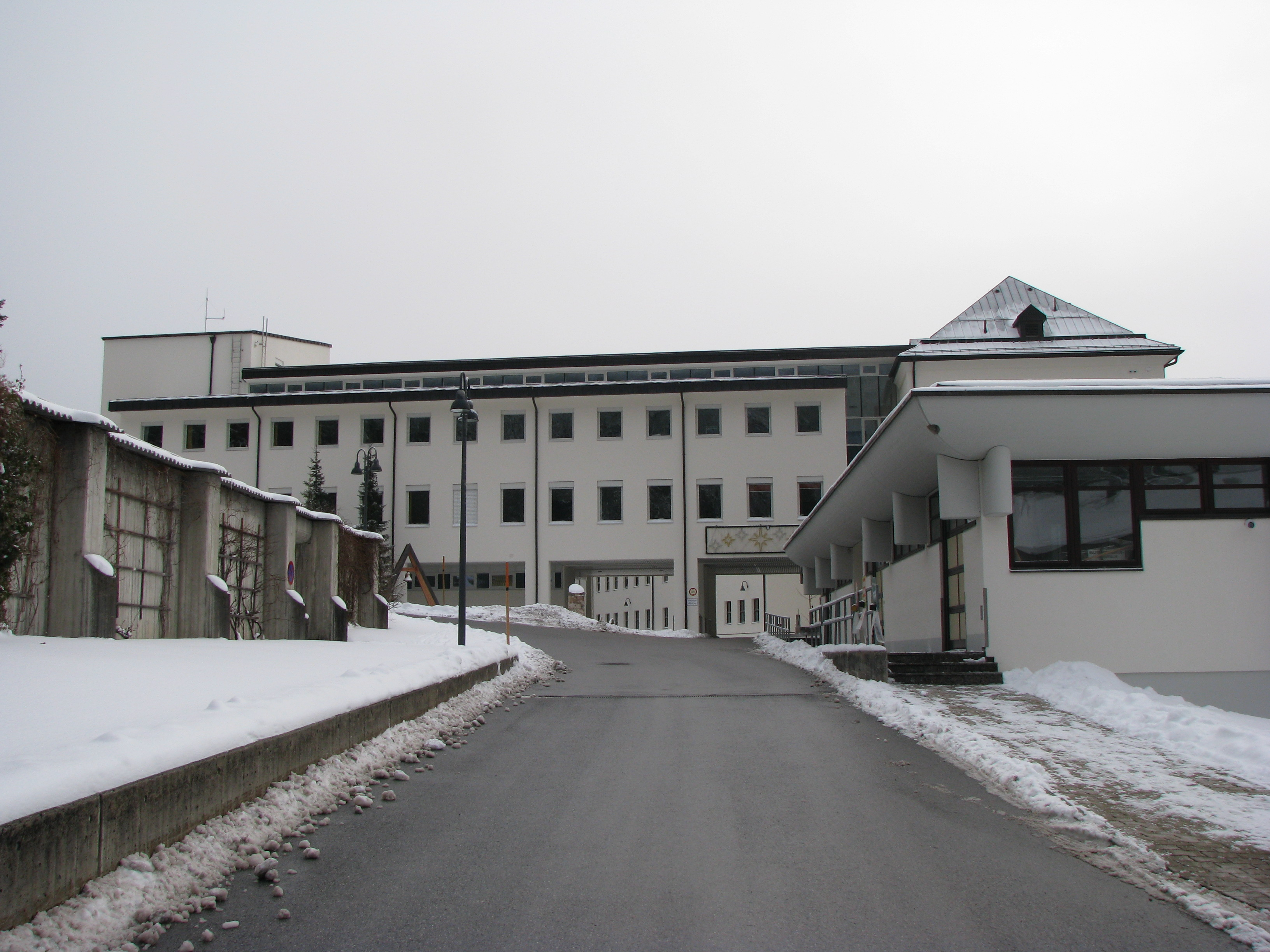 Landeskrankenhaus Hochzirl